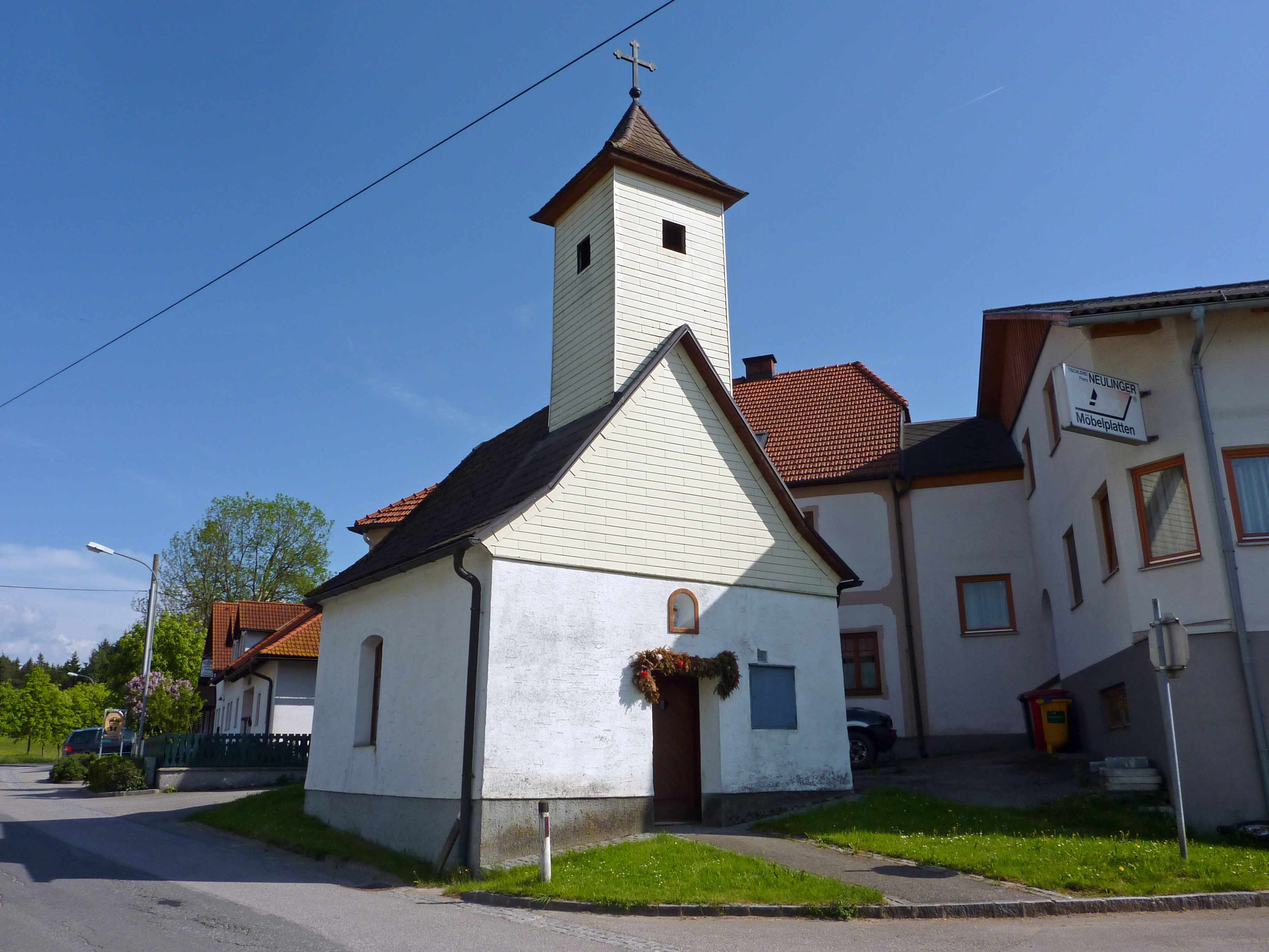 Ortskapelle Kleinhaslau, Sallingberg, Niederösterreich